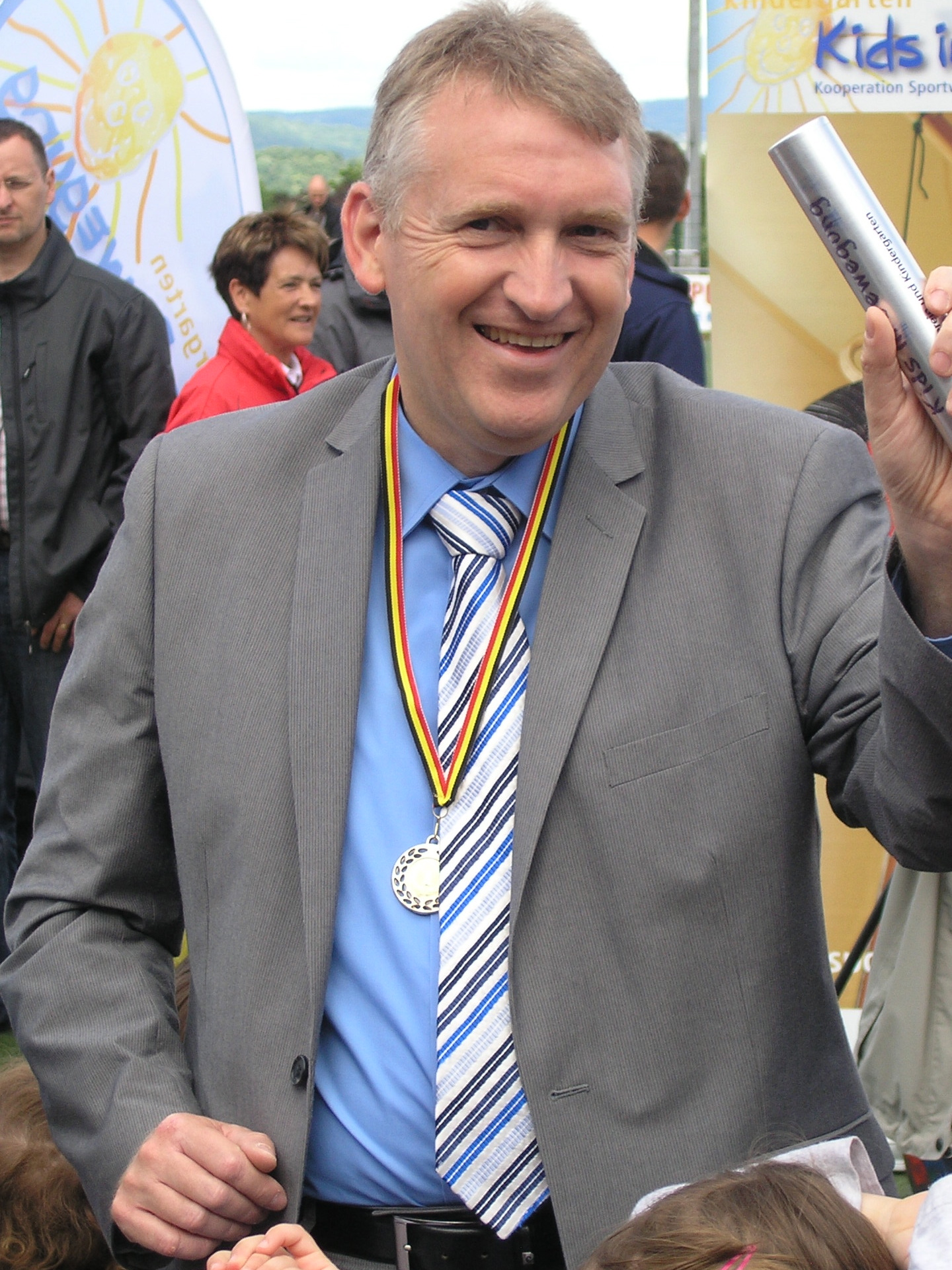 Der Landrat des Landkreises Saarlouis, Patrik Lauer, bei der Veranstaltung "10 Jahre Kids in Bewegung" in Winterbach (Saar).